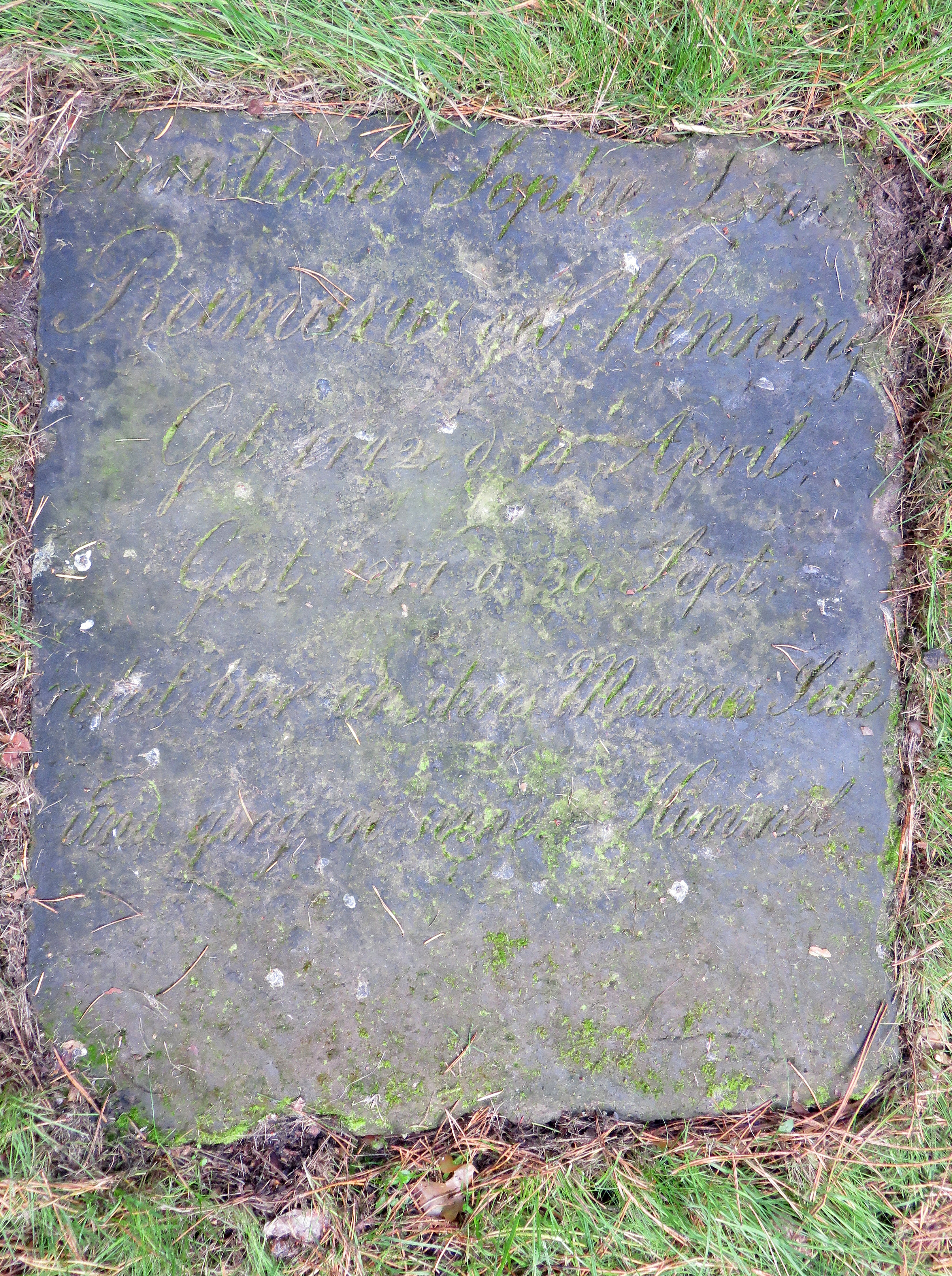 Am Boden liegende Grabstein-Fragmente (Zustand 2018!) der beiden Sandstein-Stelen für den Hamburger Arzt und Forscher („Dr. der Arzeneygelahrtheit, Prof. der Naturgeschichte“) Johann Albert H(e)inrich Reimarus sowie seine Ehefrau, die deutsche Aufklärerin Sophie Reimarus. Ehemaliger Standort der beiden Stelen von 1814/1817 war der alte Begräbnisplatz der St. Petri Kirche (Teil der alten Hamburger “ Dammtorfriedhöfe”), heute Teil der weitläufigen Sieveking-Familien-Grabanlage auf dem Hamburger Friedhof Ohlsdorf, Planquadrat S 25 / S 26.Details bei Eberhard Kändler: Begräbnishain und Gruft. Die Grabmale der Oberschicht auf den alten Hamburger Friedhöfen. Christians Verlag, Hamburg 1997, ISBN 3-7672-1294-3 S. 130-131 sowie Barbara Leisner, Heiko K. L. Schulze, Ellen Thormann: Der Hamburger Hauptfriedhof Ohlsdorf. Geschichte und Grabmäler., Verlag Hans Christians, Hamburg 1990, S. 23, Kat. 63 (einschl. historischer Abbildung).